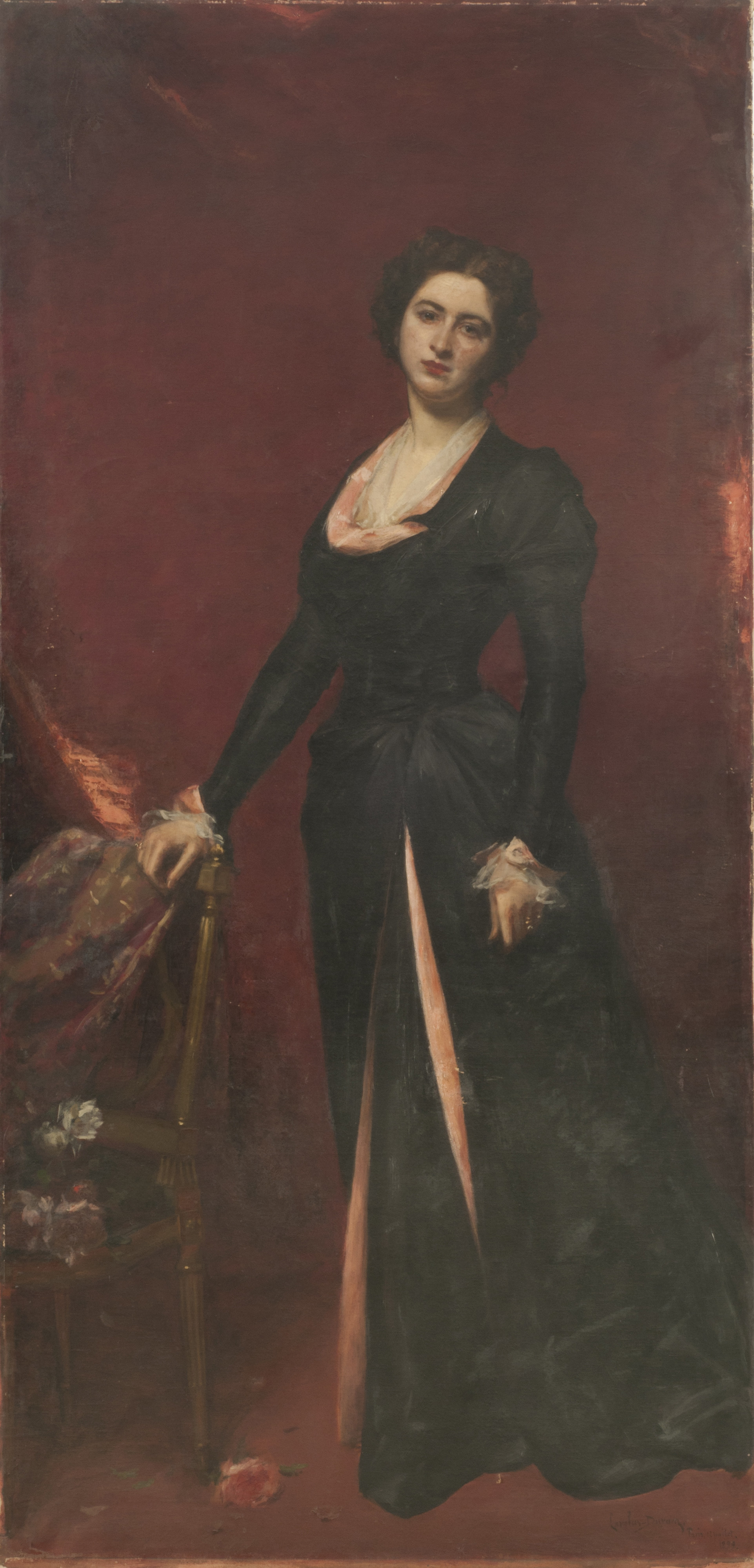 Carolus-Duran, Retrato de María Reyna de Fernández Blanco. 1899. 217 x 105 cm, óleo sobre tela. Inv. 7061.